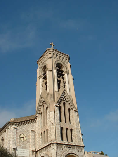 Le clocher de l'église St Joseph